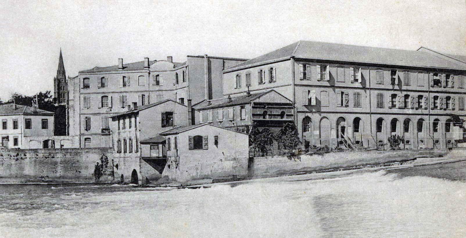 Moulins du château Narbonnais, sur la Garonnette, avenue Maurice-Hauriou.Écrite en 1919.Moulin du Château, dans son dernier état, avant l'incendie de 1942 et sa démolition ; au fond, le clocher de l'église de la Dalbade.Vue d'ensemble.